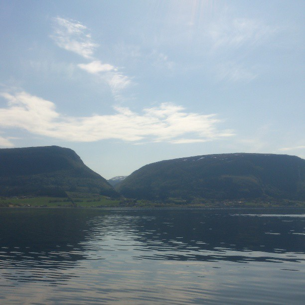 Vennastranda i Snillfjord Kommune